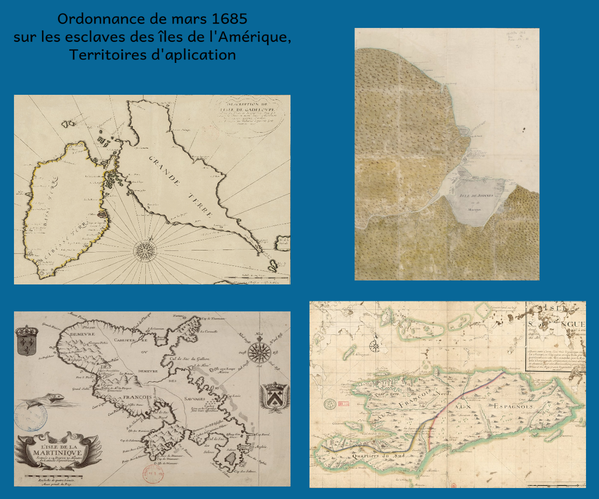 Image composite réalisée sous Gimp & Inskape : Guadeloupe, BnF-407249027 ; Guyane BnF-44230443c ; Martinique BNF-40577015h ; Saint-Domingue BnF-42201701m.